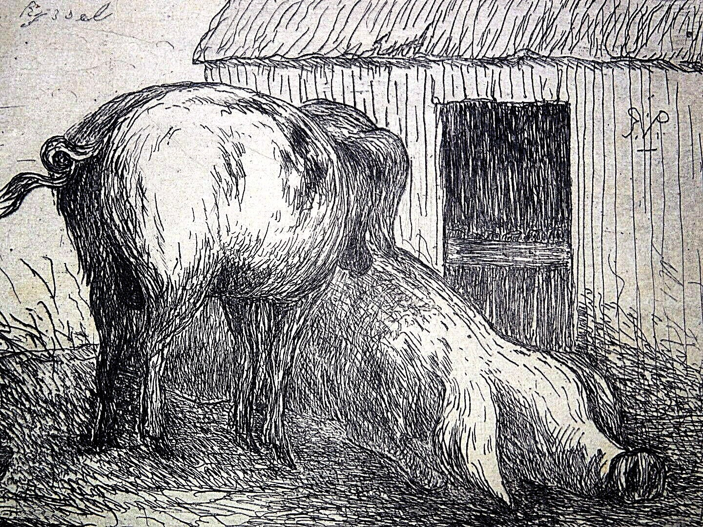 GRAVURE "COCHONS". Dimensions 12,4 x 9,3cm